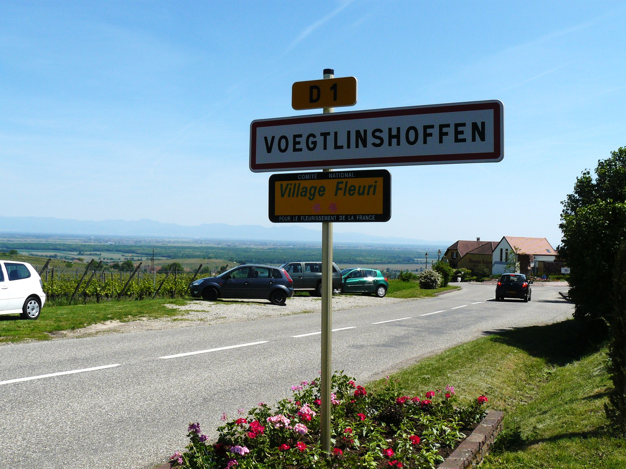 Entrée du village